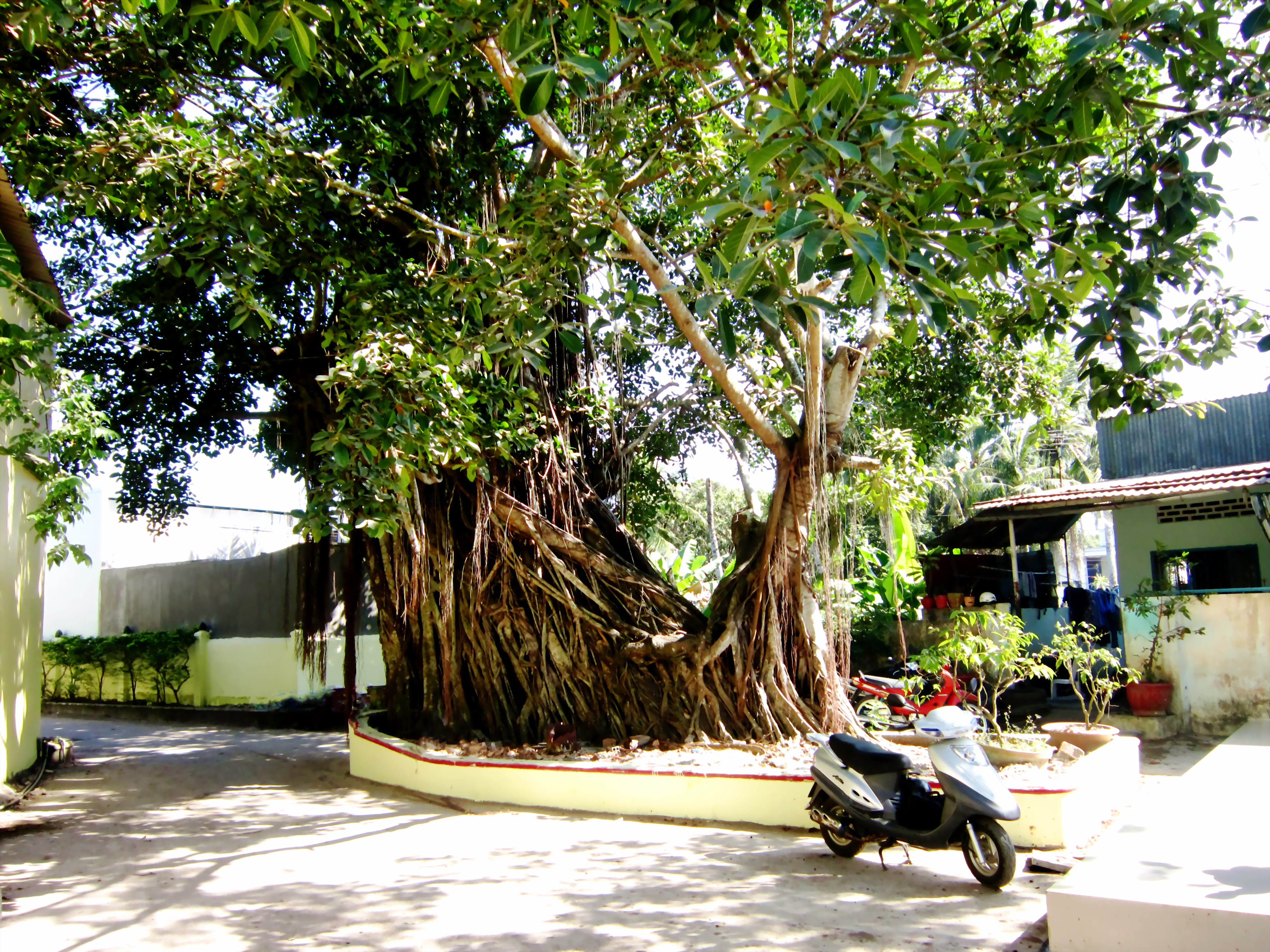 Một cây gừa cổ thụ ở thành phố Vĩnh Long (Việt Nam) có bộ gốc rễ chằng chịt.